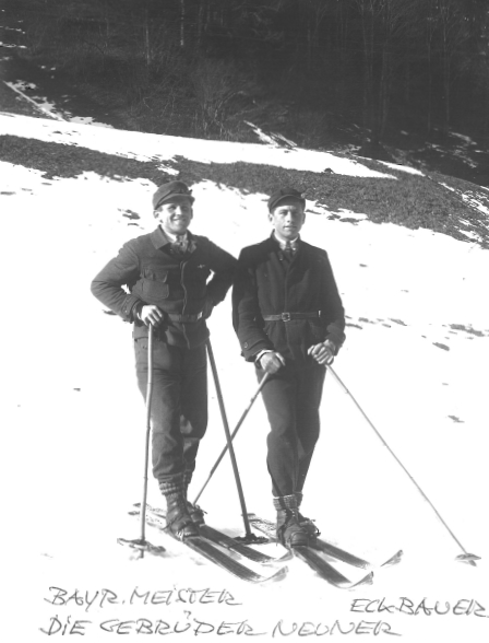 Les frères Karl et Martin Neuner